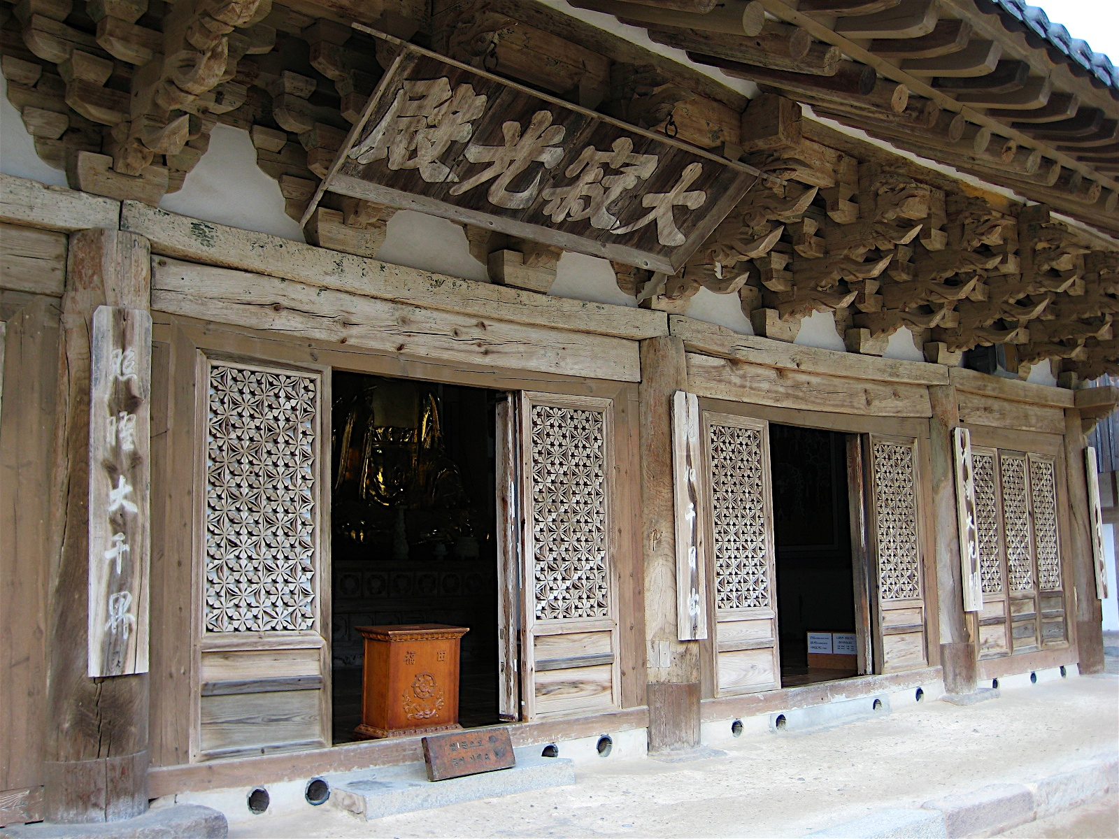 Girimsa Temple in Gyeongju, Gyeongsangbuk-do, South Korea.